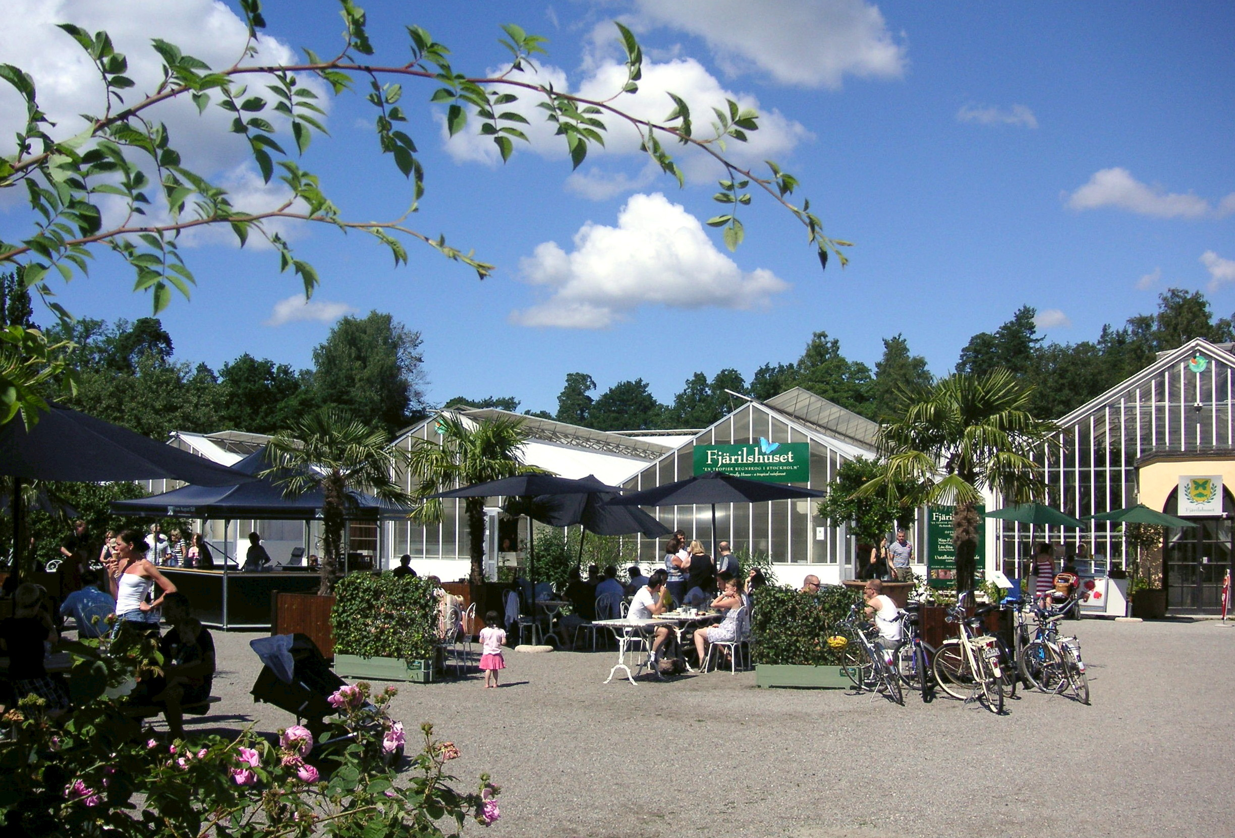 Das Schmetterlingshaus im Hagapark